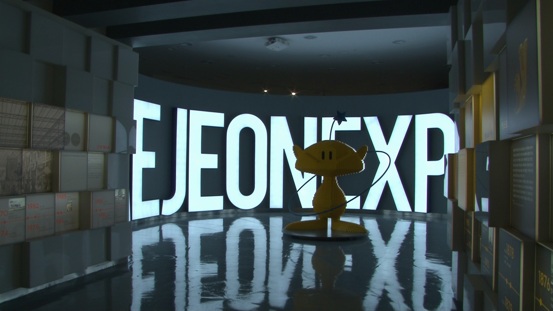 대전엑스포기념관 로비